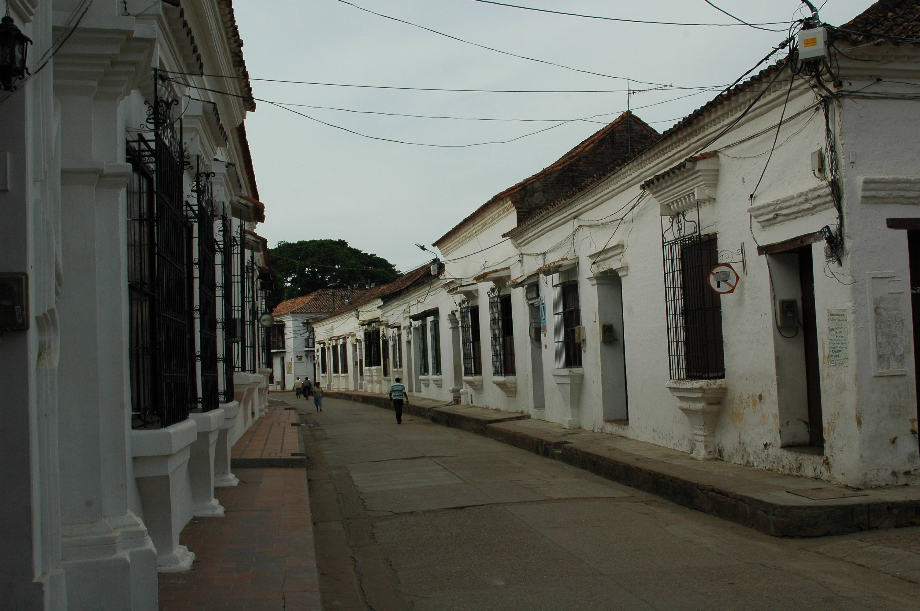 Santa Cruz de Mompox Caratteristiche facciate delle case di epoca coloniale